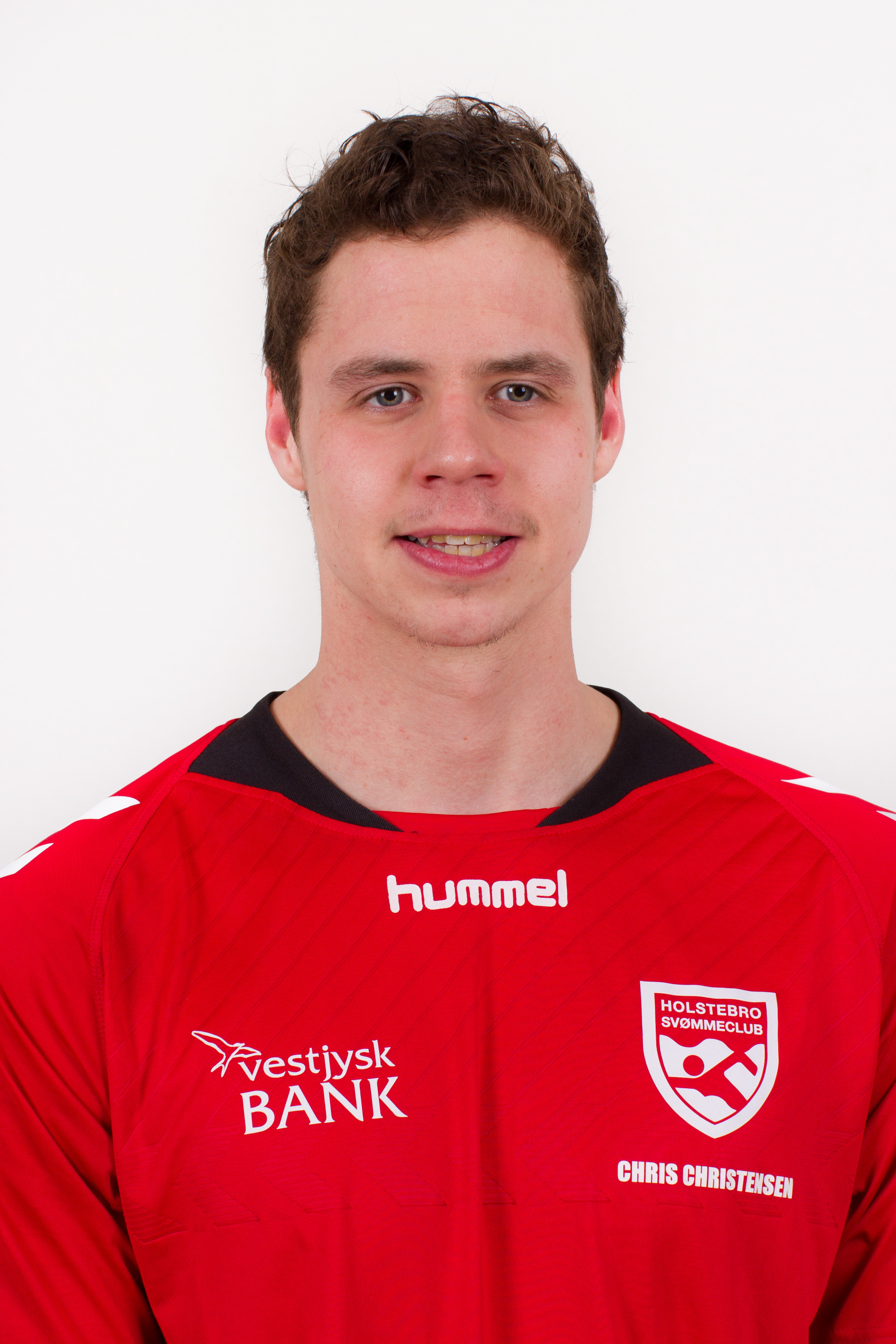 Chris Christensen er en dansk elitesvømmer, født i 1988.